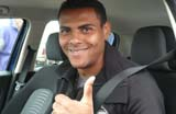 Wilson in auto saluta i tifosi del Genoa al Centro Signorini di Genova Pegli